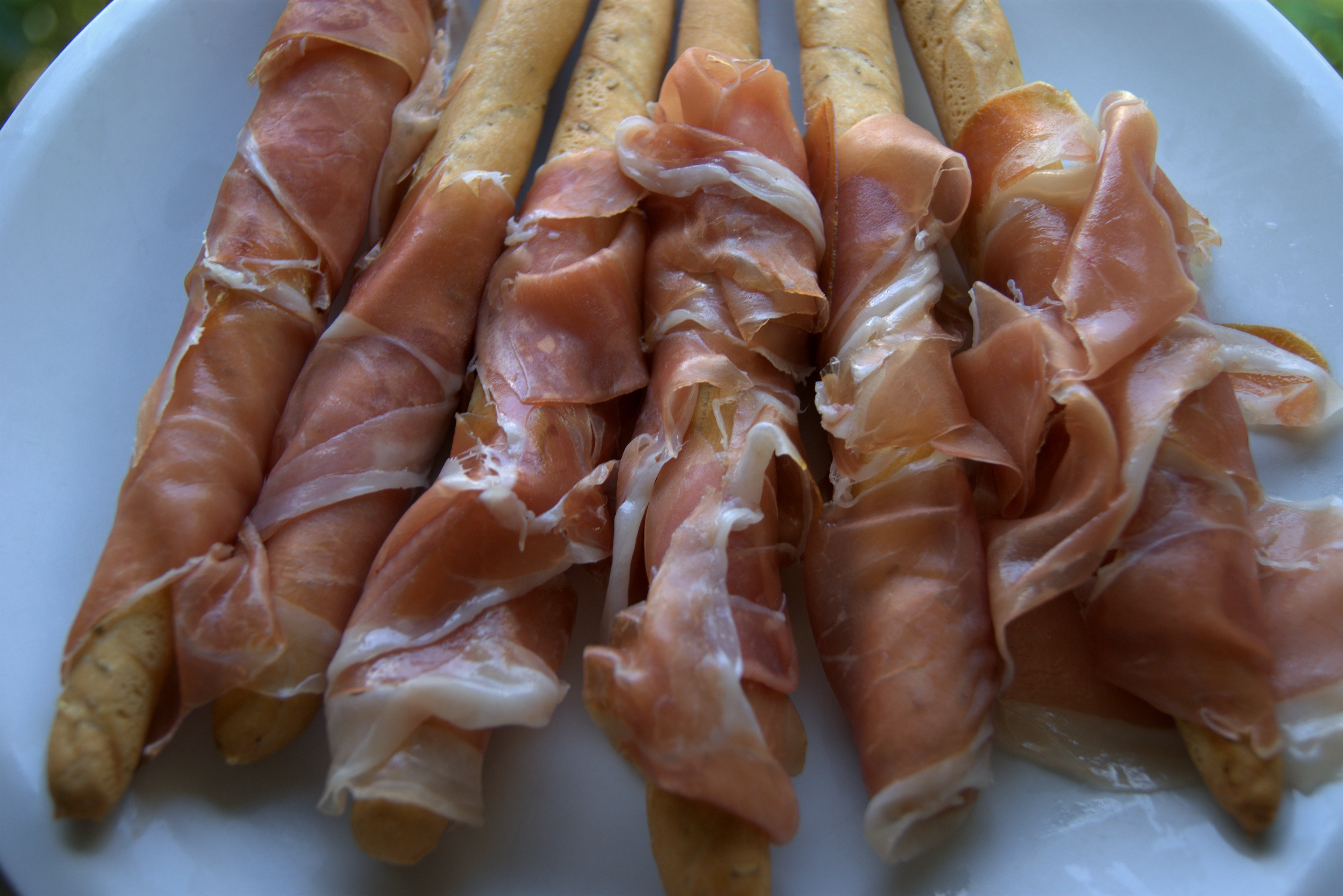 Grissini avvolti in Prosciutto di San Daniele